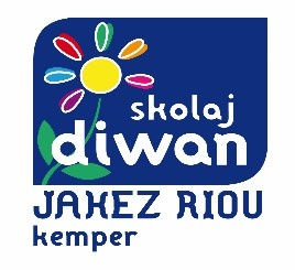 Arouez ar skolaj